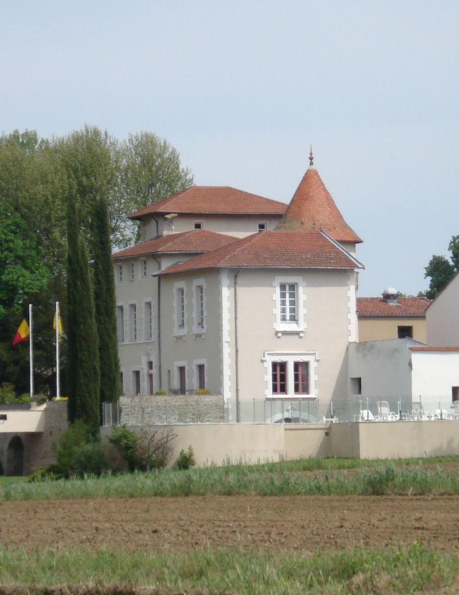 Château de Collonges, commune de Saint-Donat-sur l'Herbasse dans la Drôme